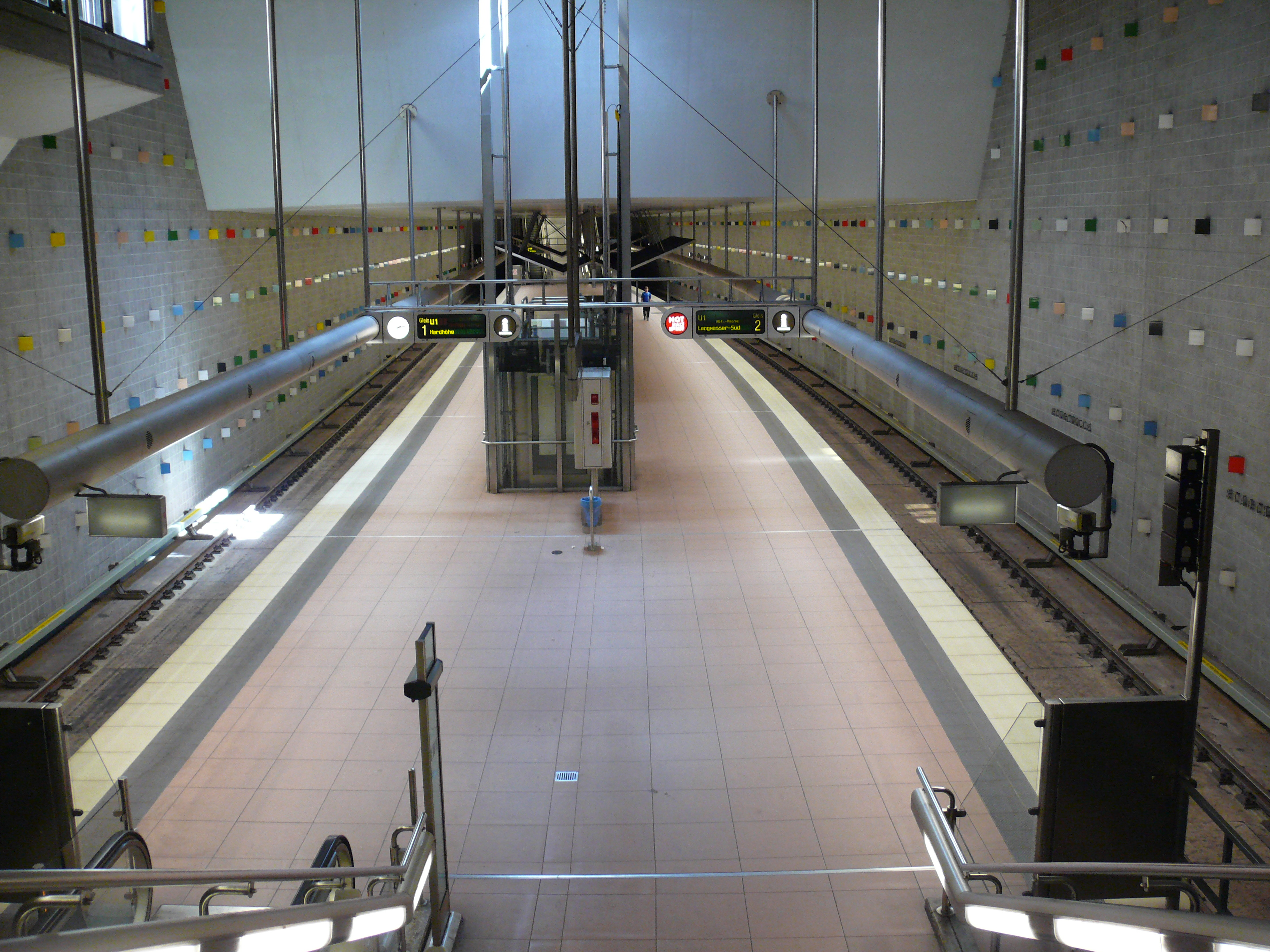 Blick auf die Bahnsteigebene am U-Bahnhof Stadthalle in Fürth. Hier die Ansicht mit den bunten Keilen an den Bahnsteigwänden.